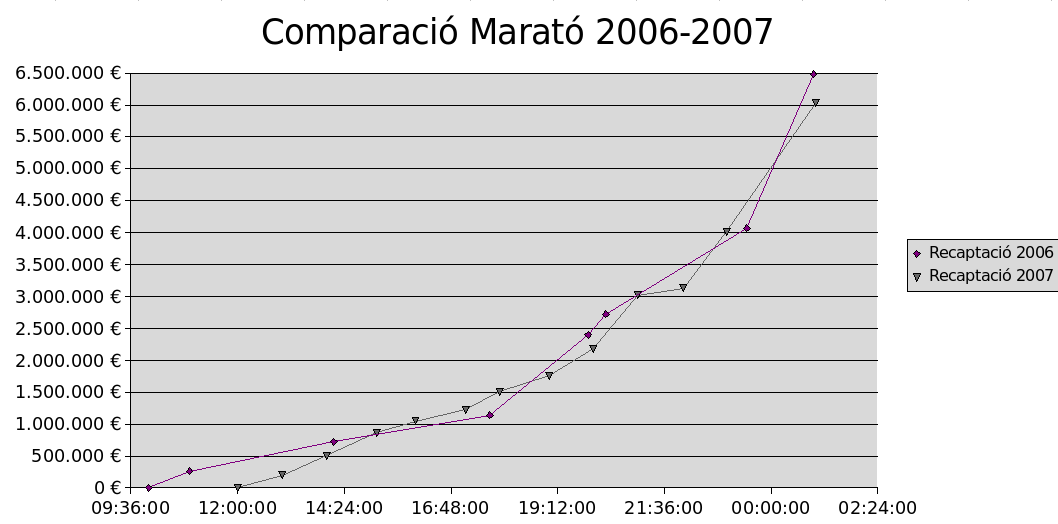 Comparative of La Marató de TV3 2006 and La Marató de TV3 2007